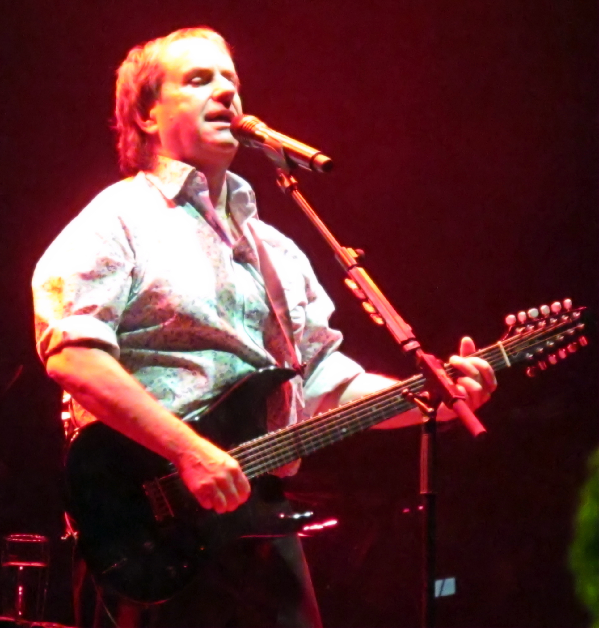 Chris de Burgh in Kempten, September 2011